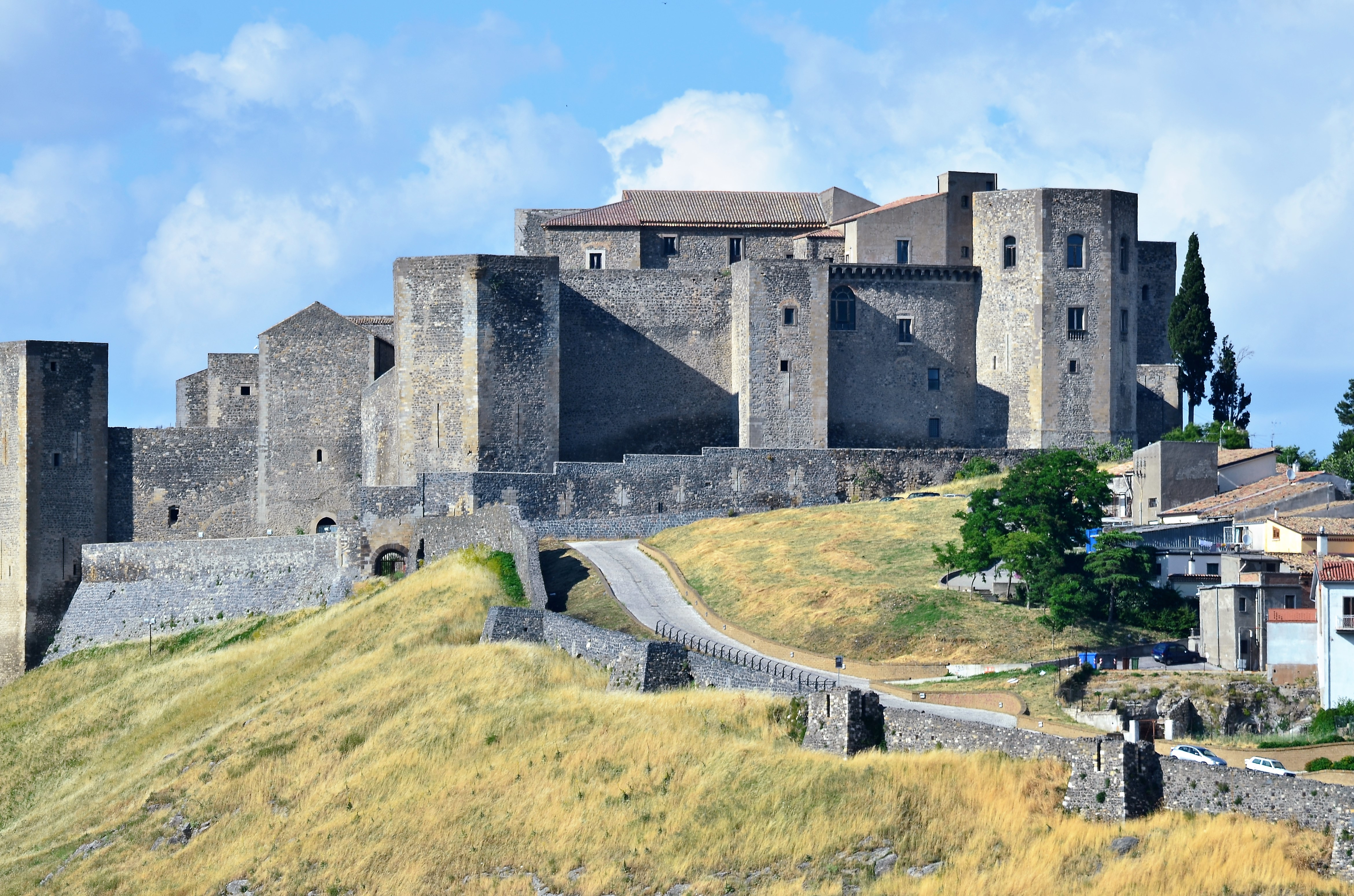 Castello federiciano This is a photo of a monument which is part of cultural heritage of Italy.